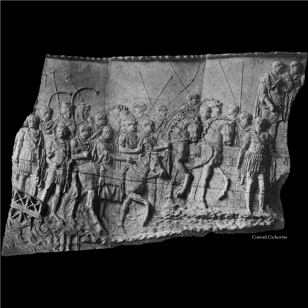 Moulage de la frise de la colonne Trajane, exposé au Museo della Civiltà Romana, Rome.